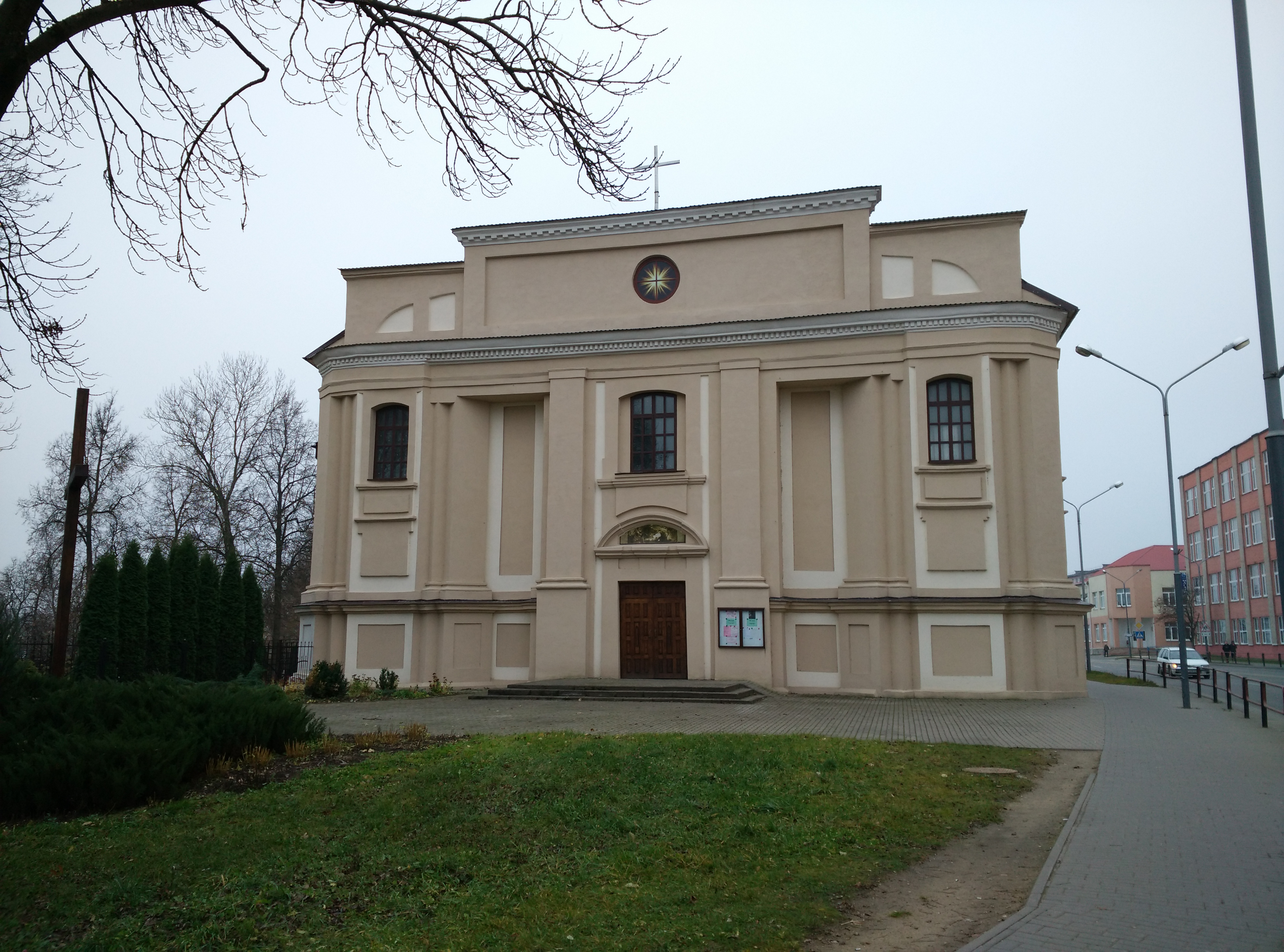 Касцёл Святога Язэпа ў Оршы.